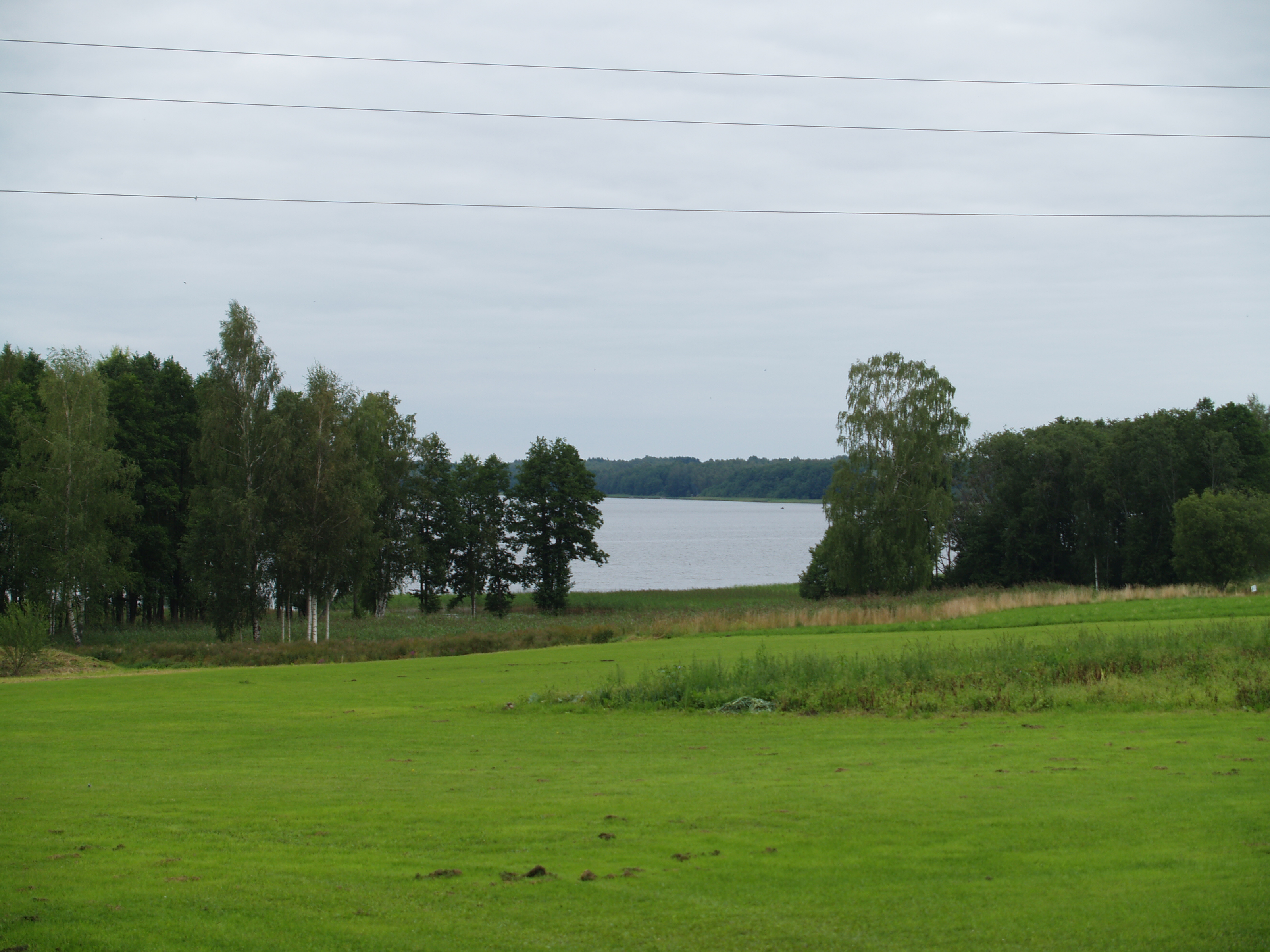 Lādesi järv